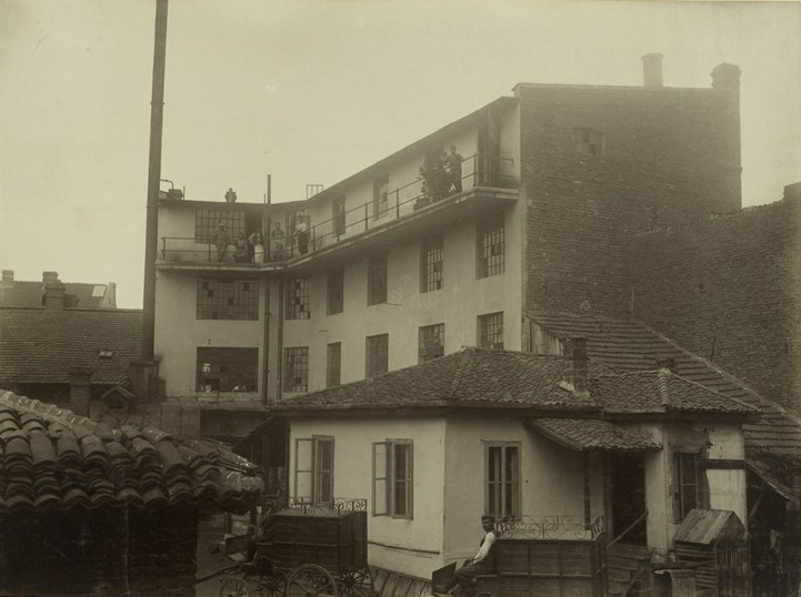 Фабрика за шоколад, бонбони, бисквити, стеаринови свещи и пр. на Велизар Пеев в София. Основана в 1901 г. с основен капитал 60 000 лева, с 15 работници. През 1912 г. е с основен капитал 1 000 000 лева и 100 работници. Фотоалбум с фотографии на български индустриални предприятия от периода 1887-1912 г., подарен от Съюза на българските индустриалци на цар Фердинанд І по случай 25-годишнината от възшествието му на българския престол.